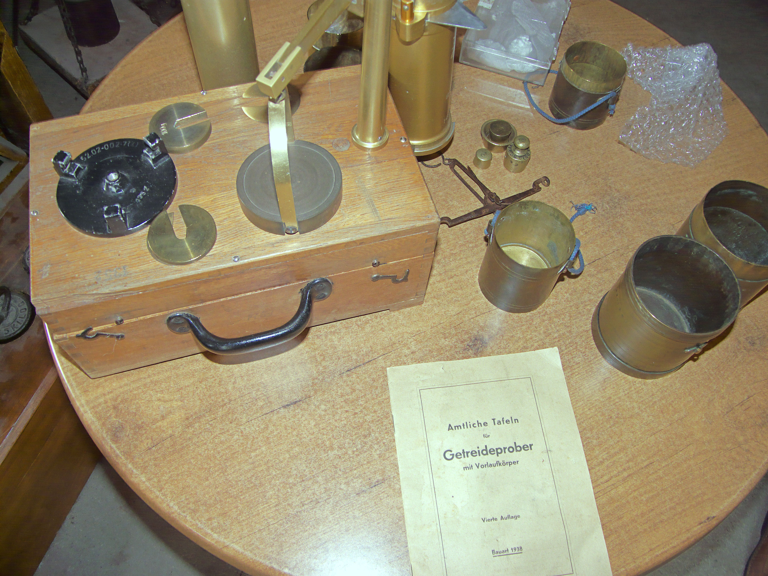 Spoordonkse Watermolen, bepaling hectolitergewicht